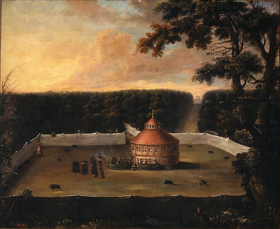 Ehemaliges Jagdschloss Jägersburg bei Einhausen (Hessen), erbaut 1609.